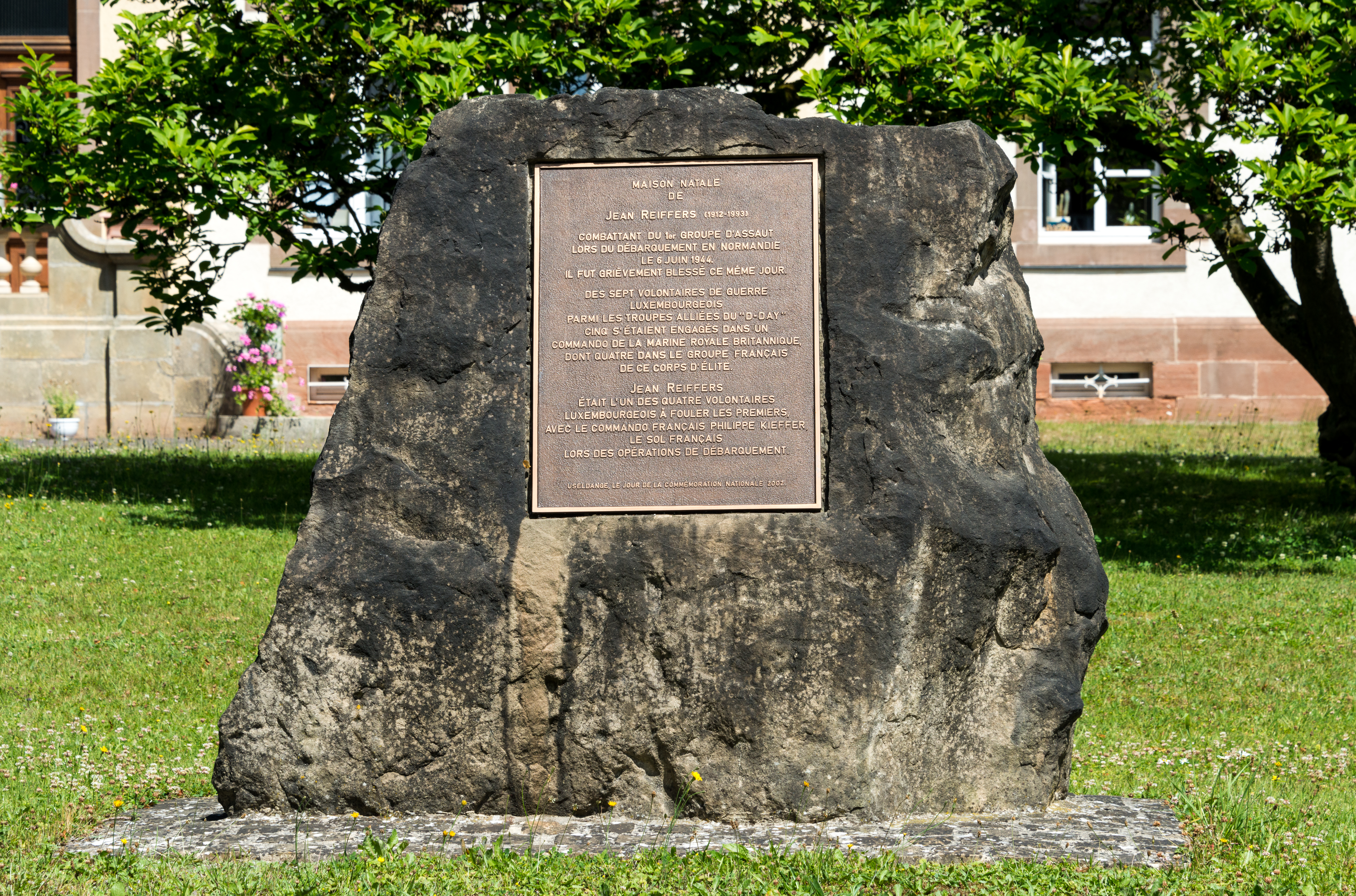 Erënnerung un de Jean Reiffers bei sengem Gebuertshaus, 14, rue d'Everlange zu Useldeng.